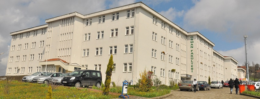 Bartın Orman Fakültesi Binası